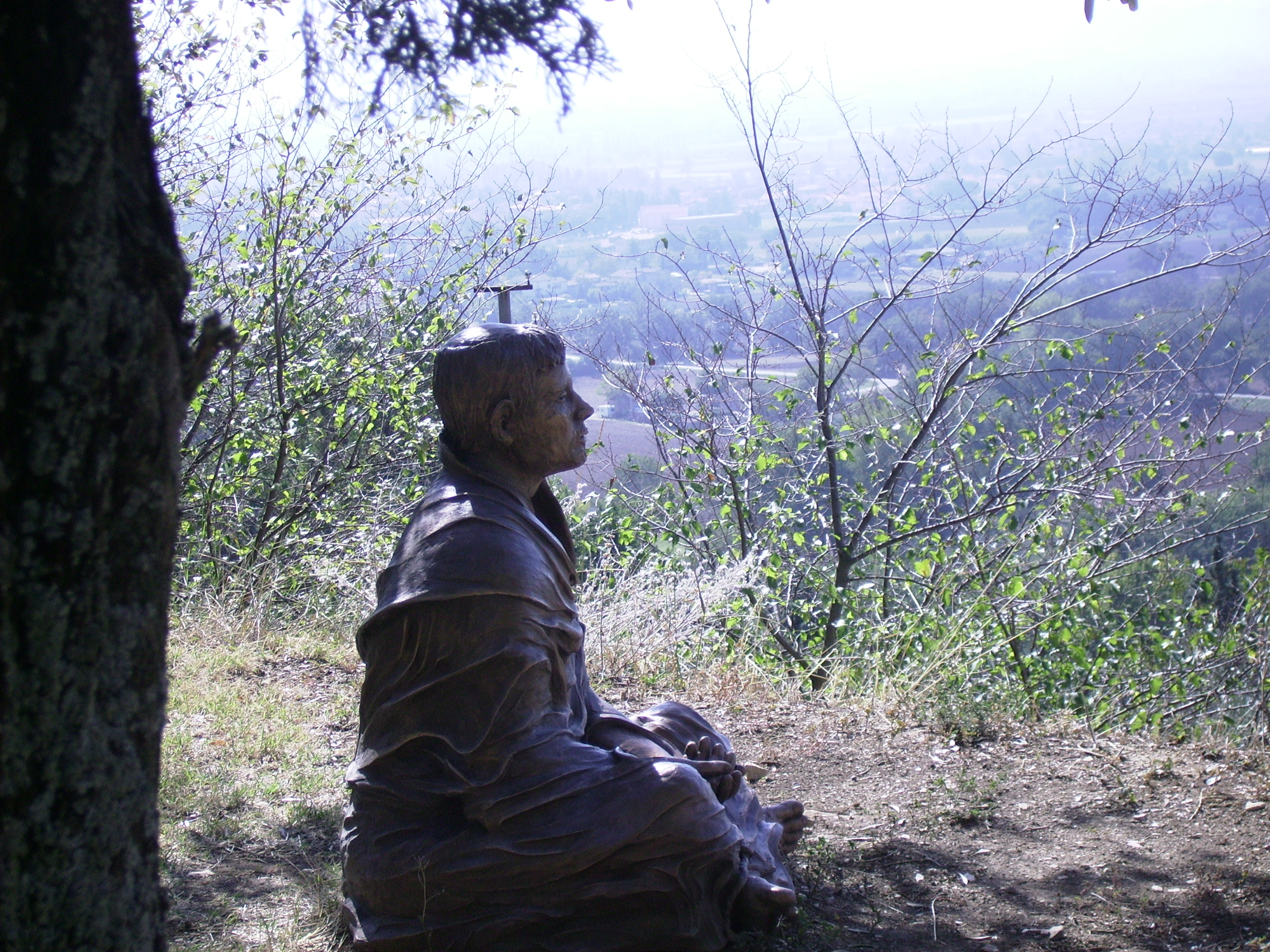 Statua di S. Francesco d'Assisi in Preghiera, Assisi (Italia)